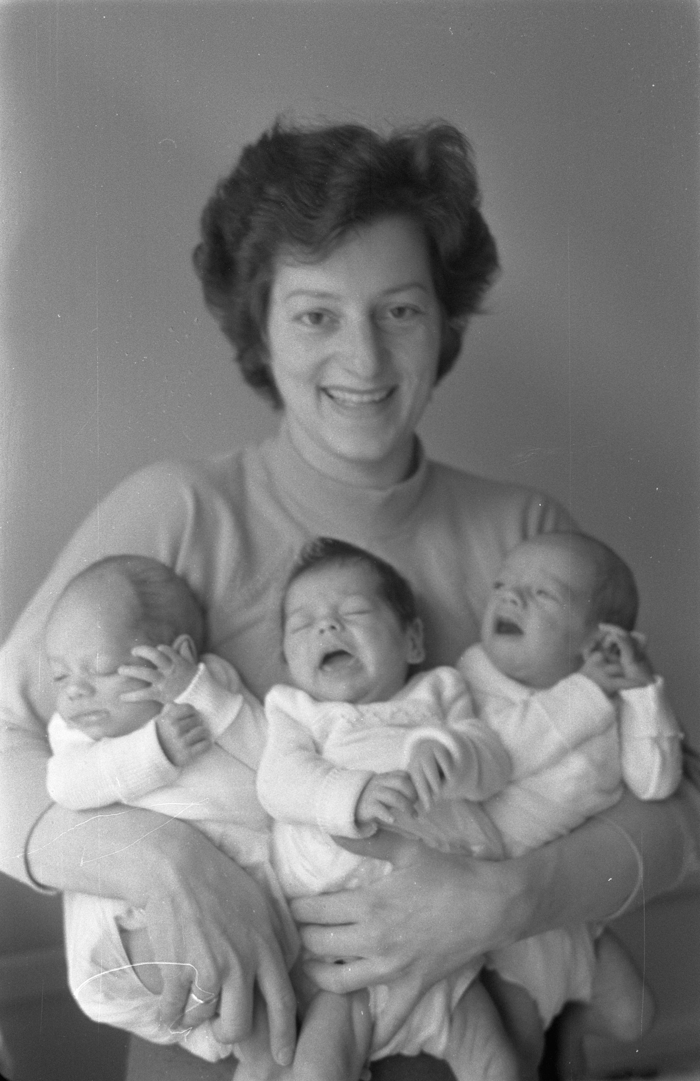 Collectie / Archief : Fotocollectie Anefo Reportage / Serie : [ onbekend ] Beschrijving : Mevrouw Van Kalken-Lieuwen , trotse moeder van drieling te Amsterdam Datum : 1 maart 1960 Locatie : Amsterdam, Noord-Holland Trefwoorden : drielingen, moeder Persoonsnaam : Mevrouw Van Kalken Lieuwen Fotograaf : Pot, Harry / Anefo Auteursrechthebbende : Nationaal Archief Materiaalsoort : Negatief (zwart/wit) Nummer archiefinventaris : bekijk toegang 2.24.01.05 Bestanddeelnummer : 911-0586